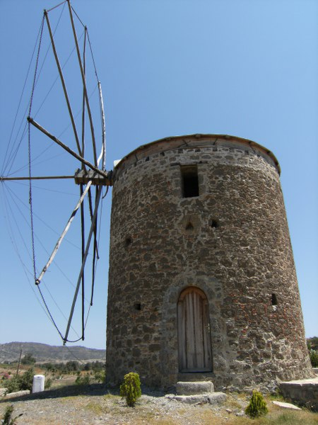 Datça girişindeki yel değirmenleri